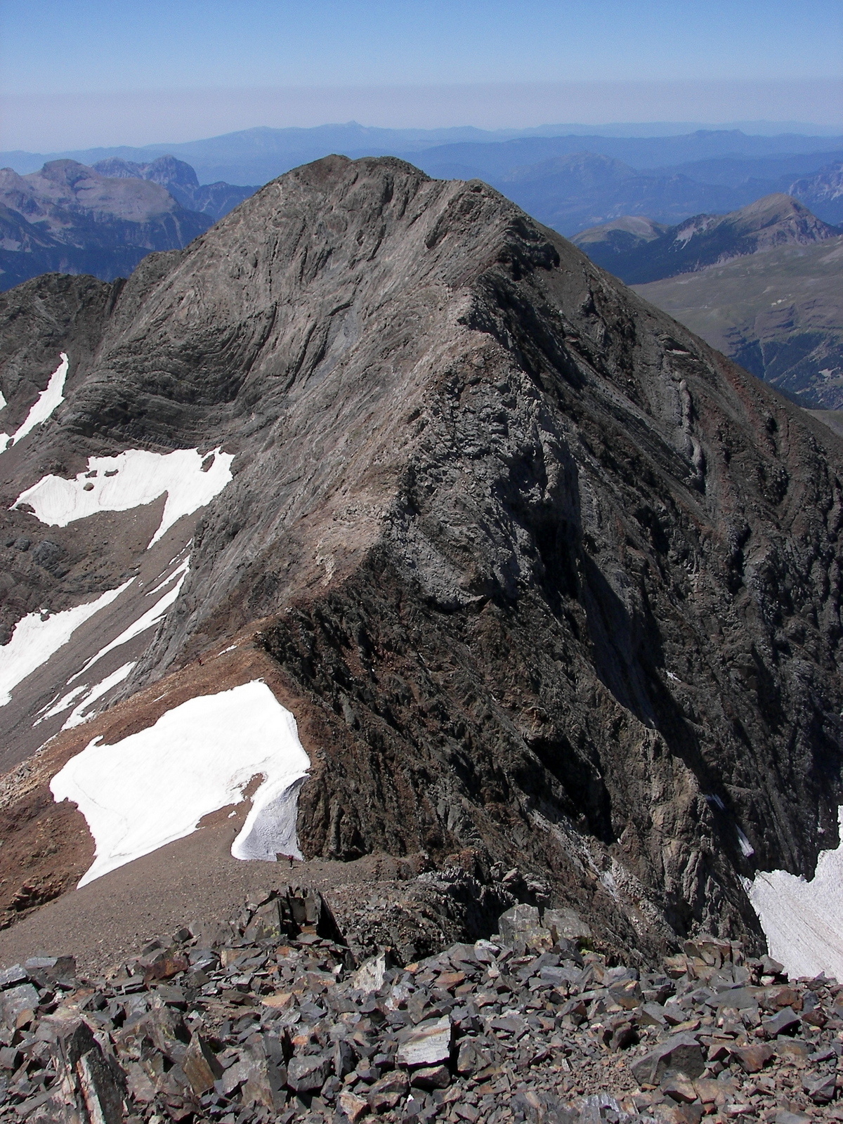 Parque natural Posets-Maladeta This is a photography of a Site of Community Importance in Spain with the ID: ES0000149. Natura2000 entry, EEA entry